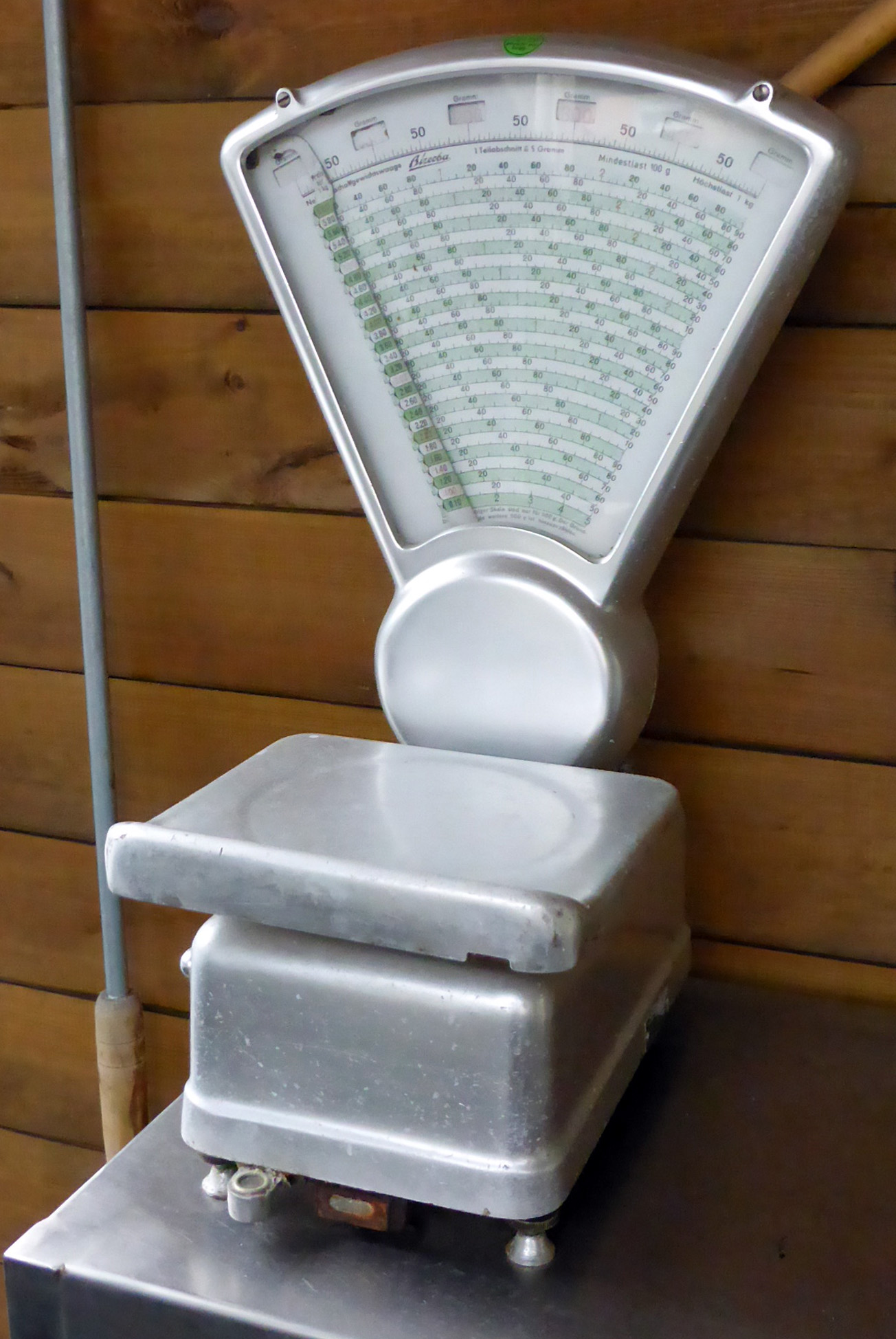 Bizerba Waage im Hotel Lenz, Fulda.